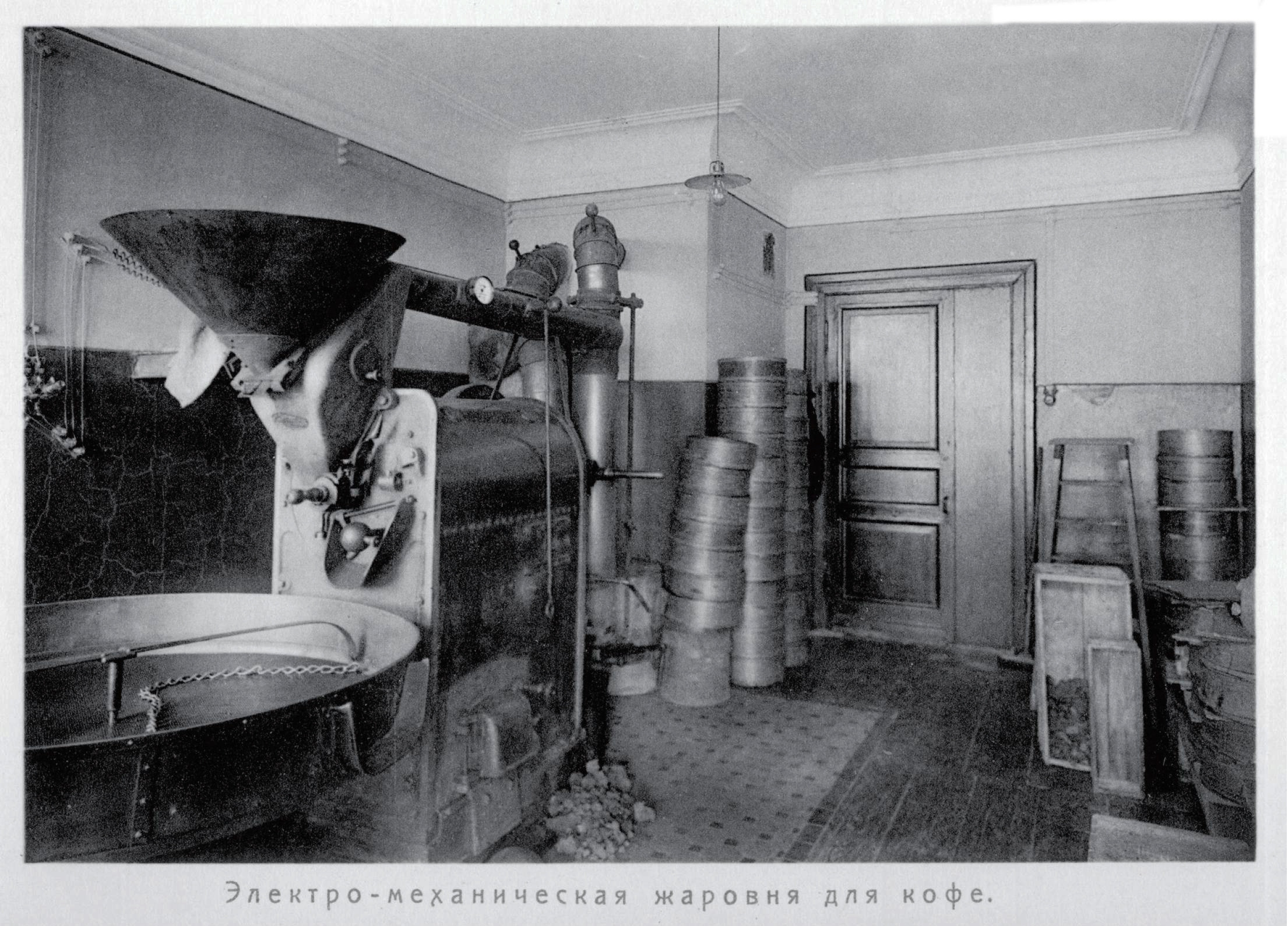 Магазин Елисеева и погреба русских и иностранных вин. Цех обжарки кофе